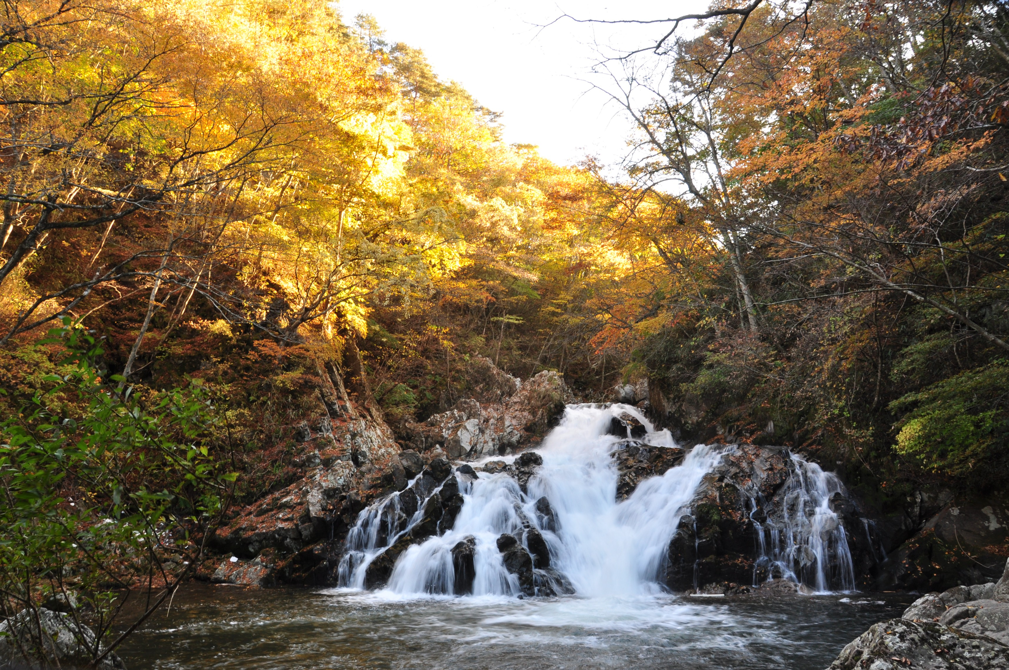 091025中野白滝（秋）